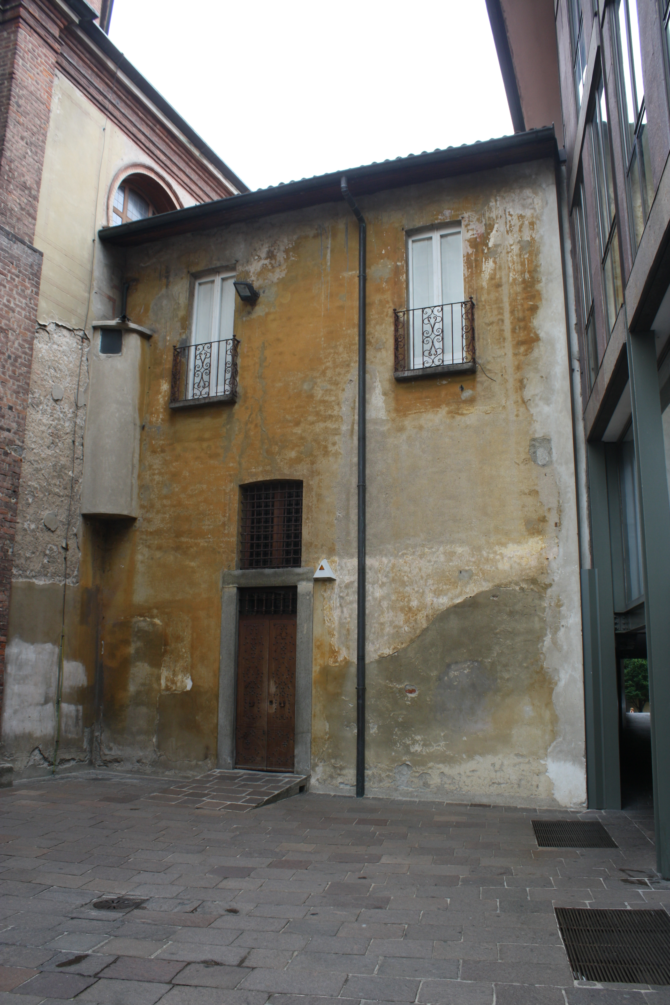 Resti dell'antica canonica della basilica di San Magno di Legnano